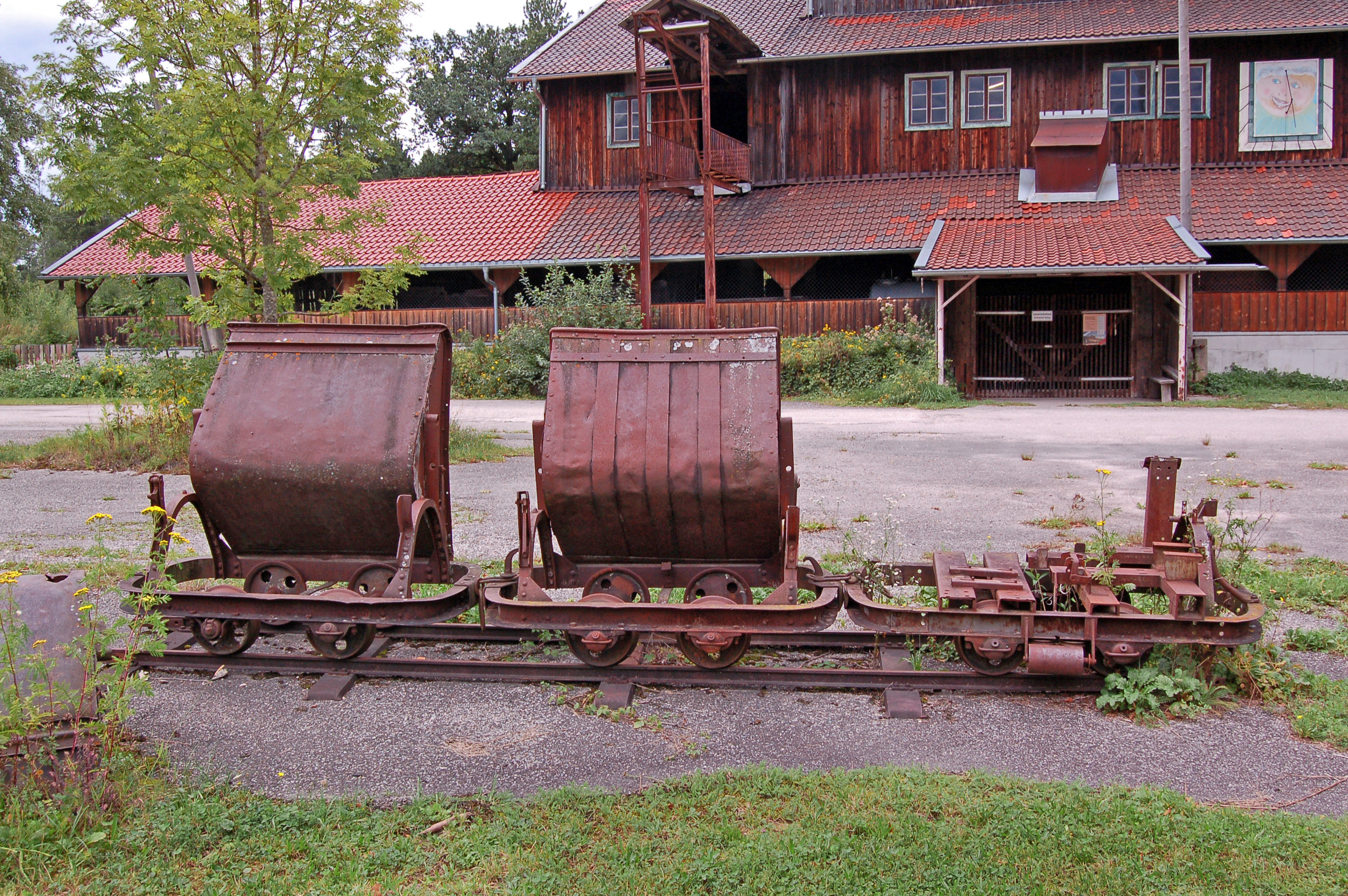 Bayerisches Moor- und Torfmuseum in Rottau.